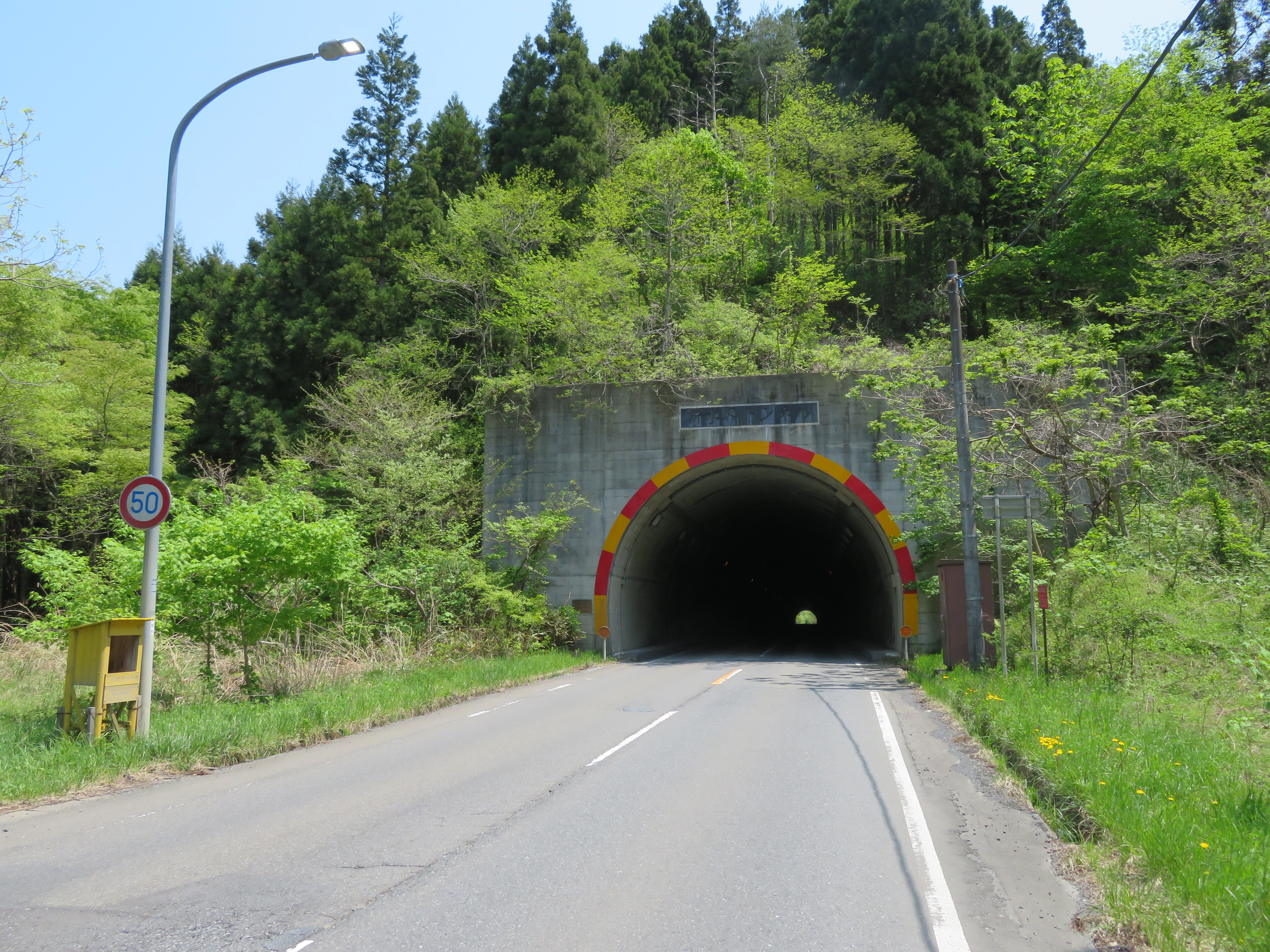 国道398号線新水界トンネル（登米市側坑口から撮影） Canon PowerShot SX720 HS